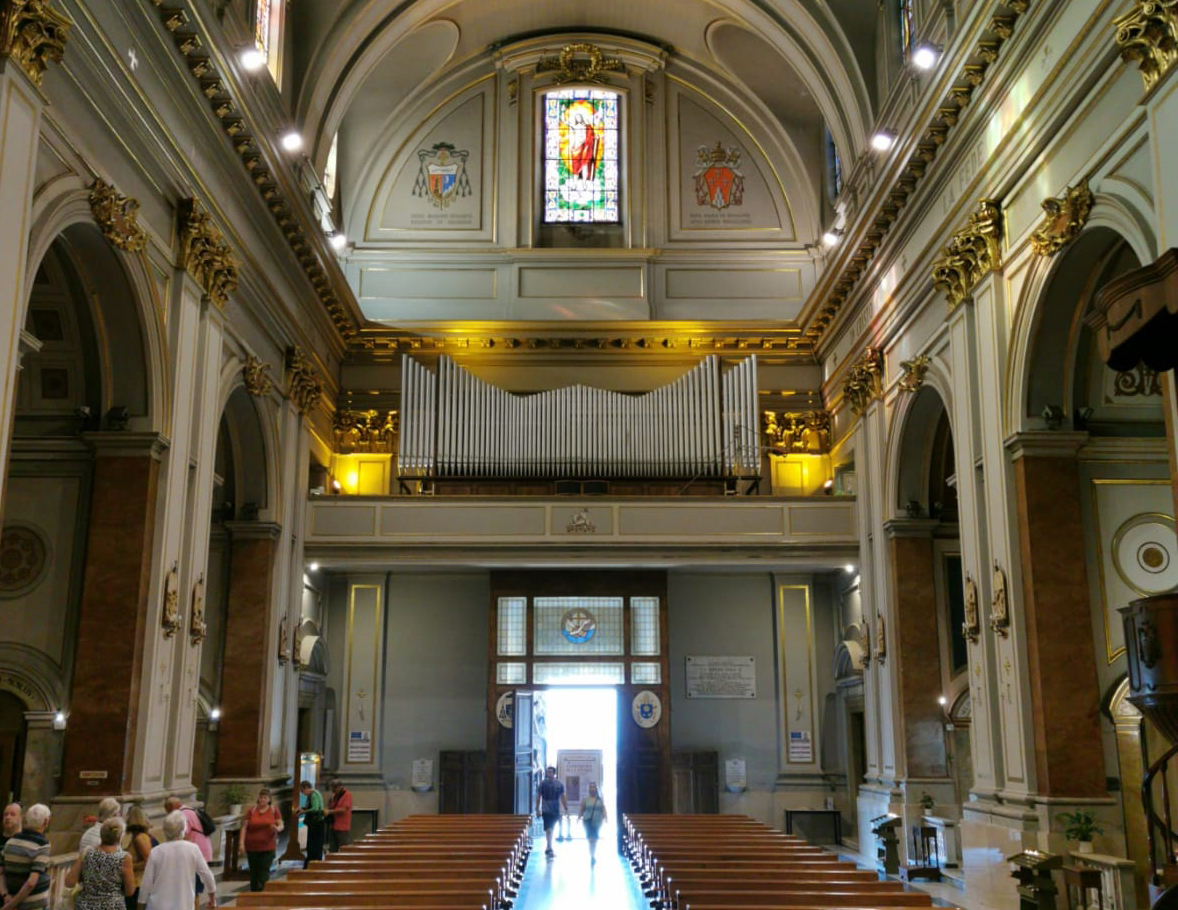 Organo Pinchi della cattedrale di Civitavecchia